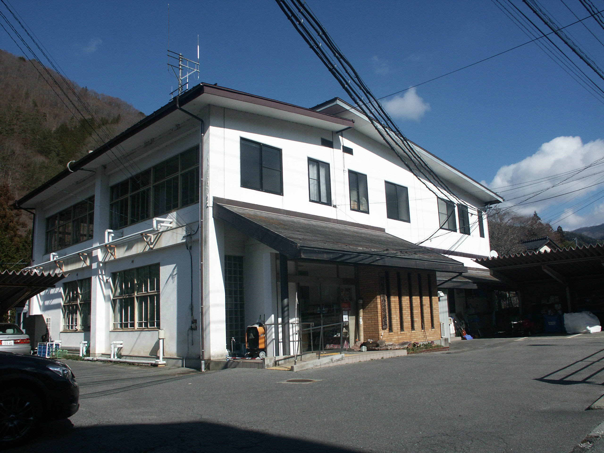 阿智村役場清内路振興室庁舎（旧清内路村役場）